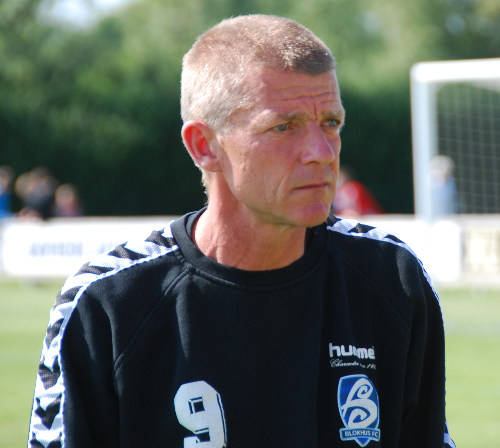 Fodboldtræneren Søren Kusk fra Blokhus FC. Her i 2. divisionskampen mod Varde IF på Jetsmark Stadion i Pandrup.